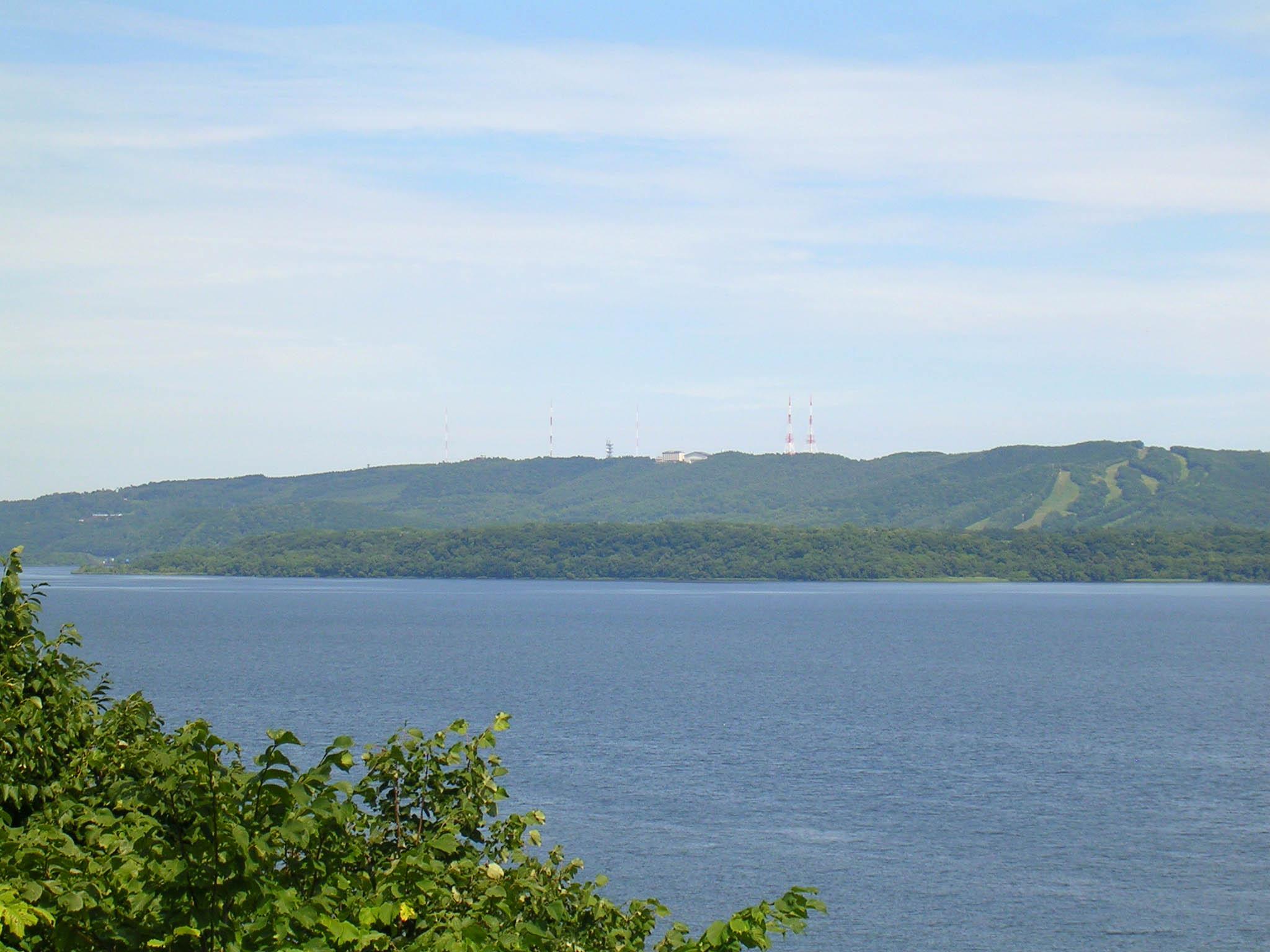 Tentozan, Abashiri, Hokkaido, Japan